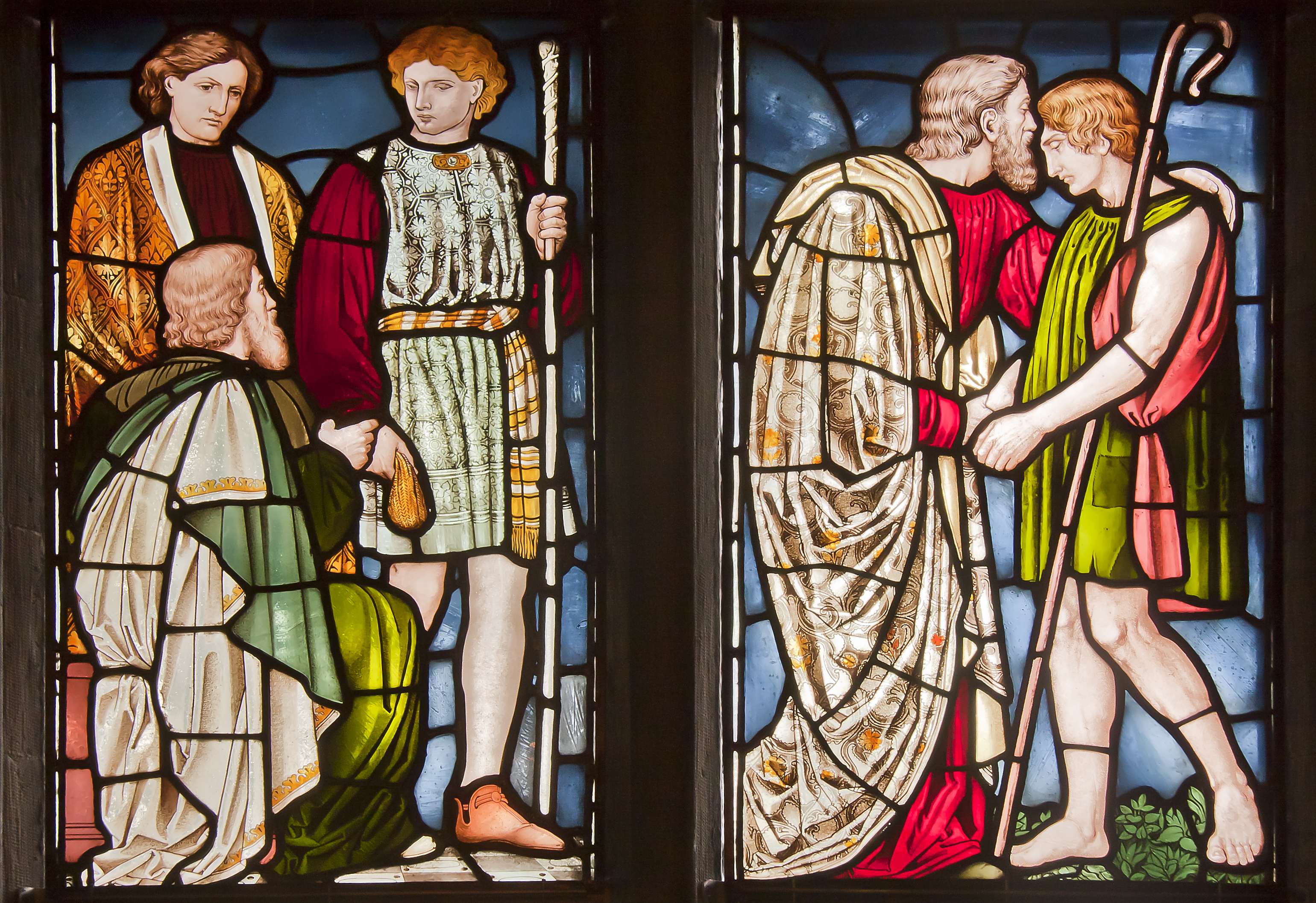 Kyrkfönster från 1800-talet i Nikolai kyrka i Örebro efter kartong av Carl Almquist. Motivet föreställer Jesu liknelse om den förlorade sonen.